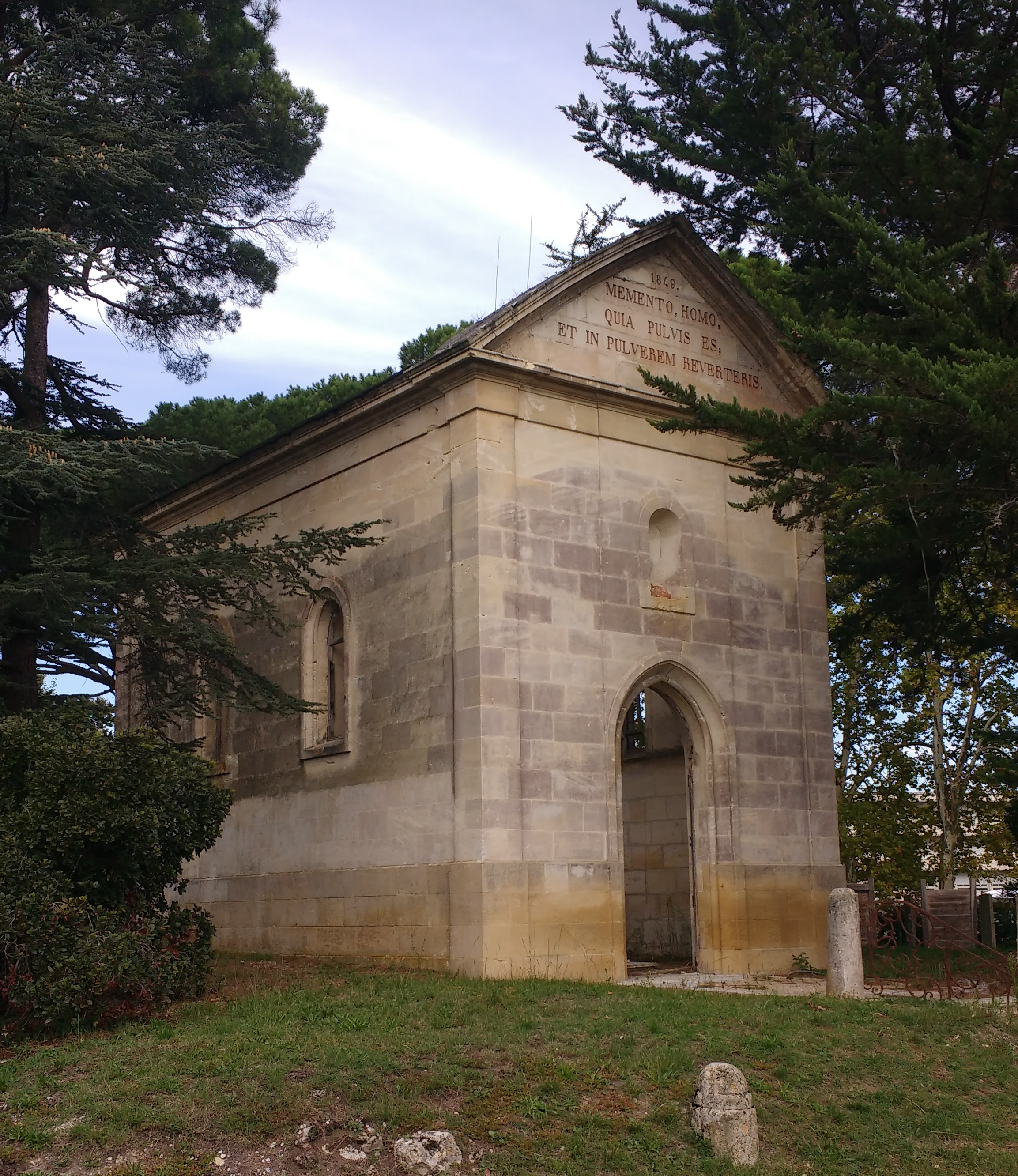 Chapelle du Château Monadey, Talence. 2017